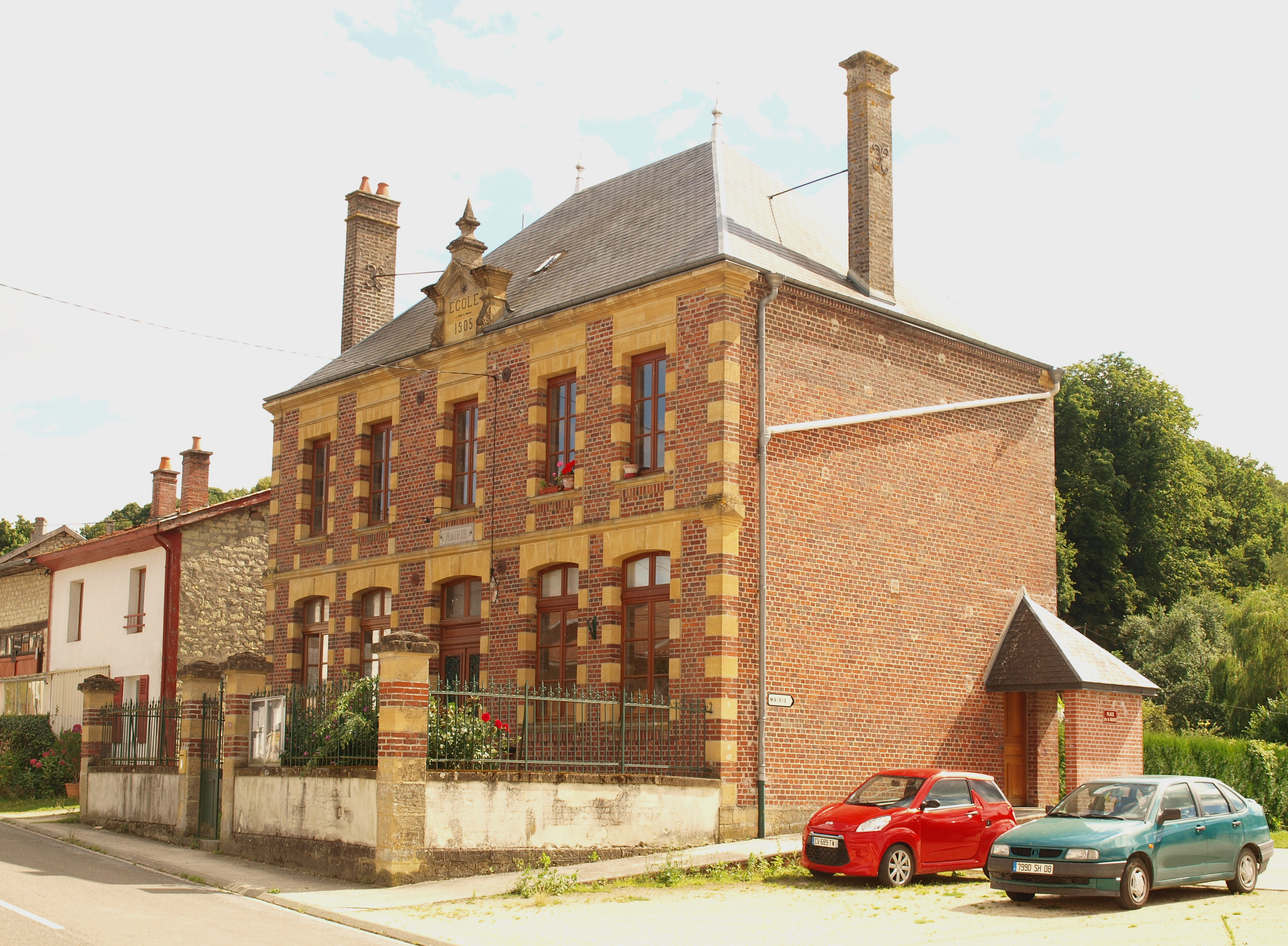 Grandham (Ardennes, France) ; mairie